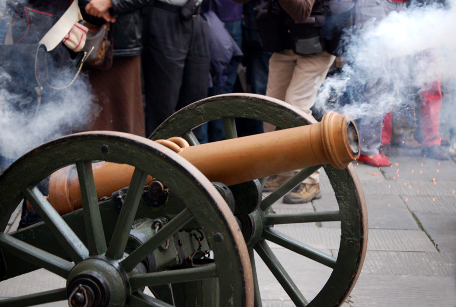 Un colpo di cannone sparato durante la rievocazione delle Pasque Veronesi (cannone francese)